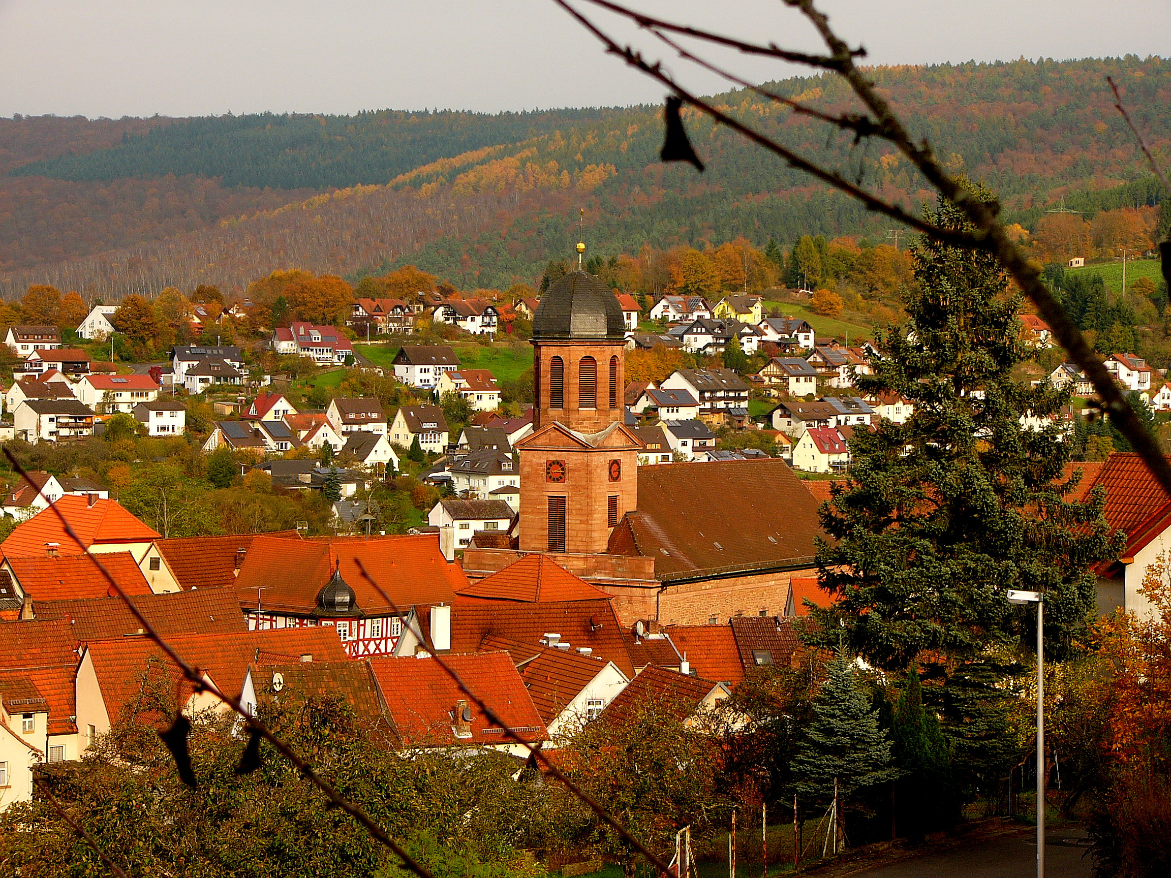 Ein Blick über das Spessart-Städtchen Rieneck. Im Zentrum gut sichtbar die kath. Pfarrkirche St. Johannes der Täufer.